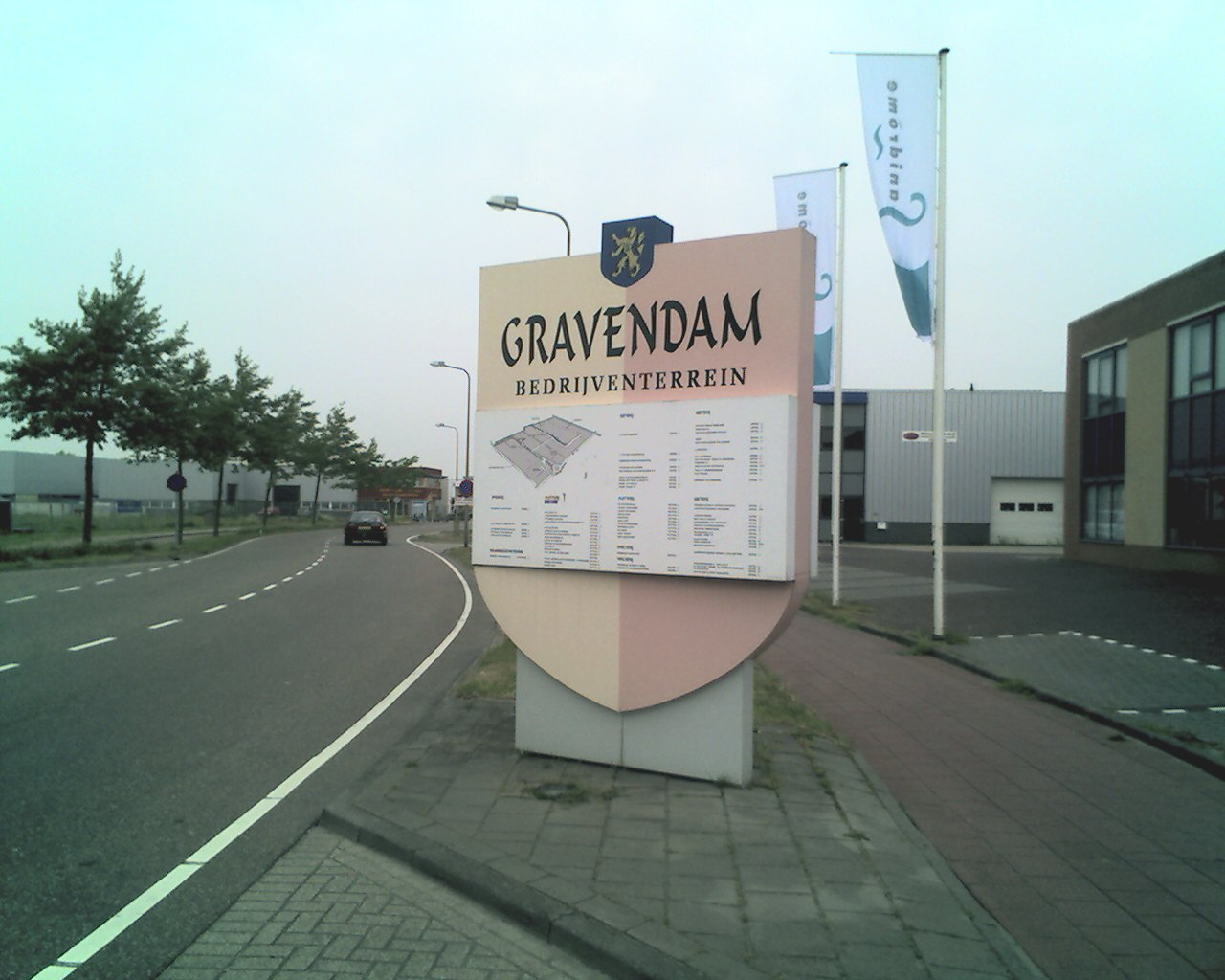 Zelfgemaakt, op 15 mei 2006 © Bouke Geerlings